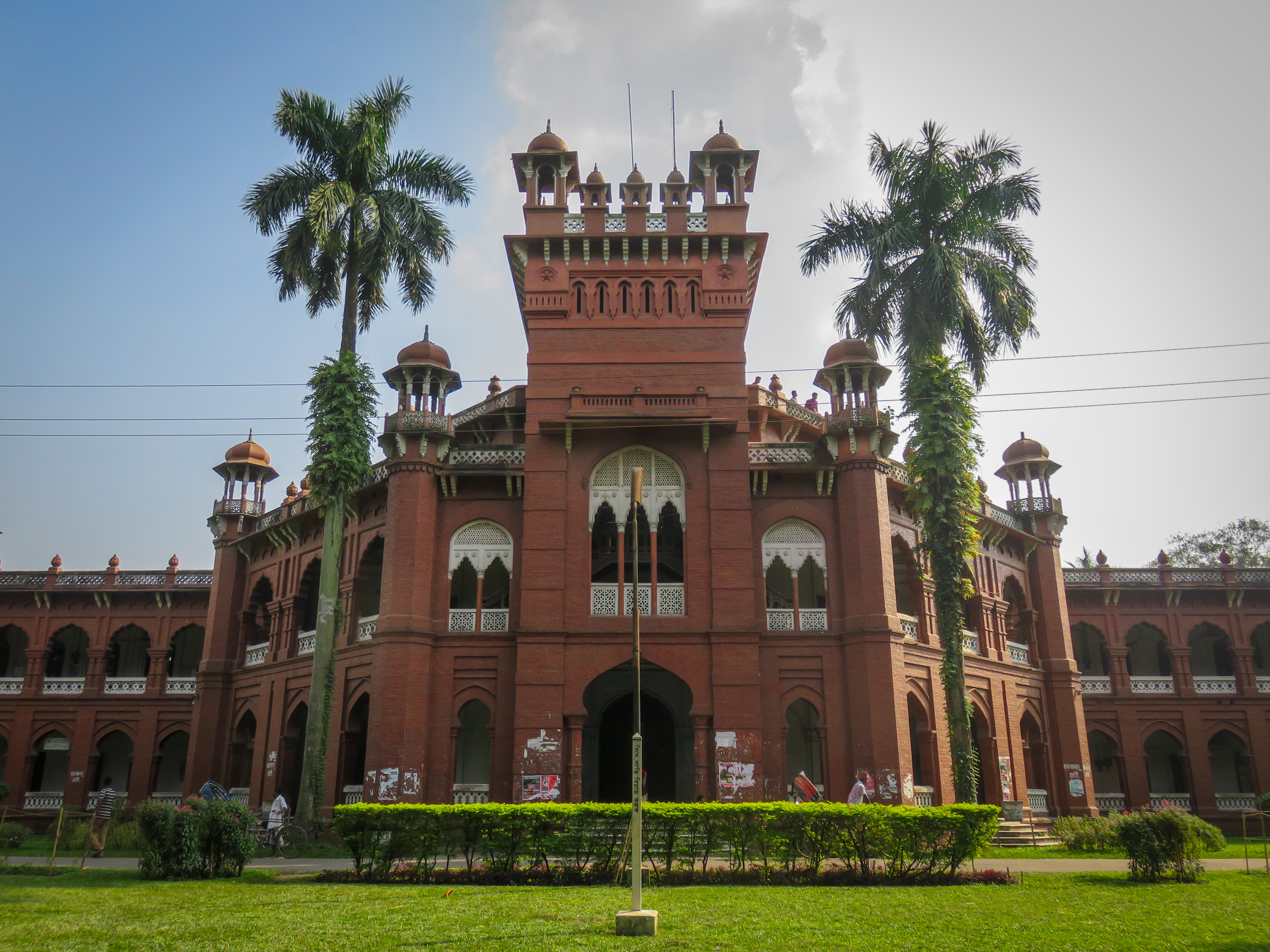 কার্জন হল